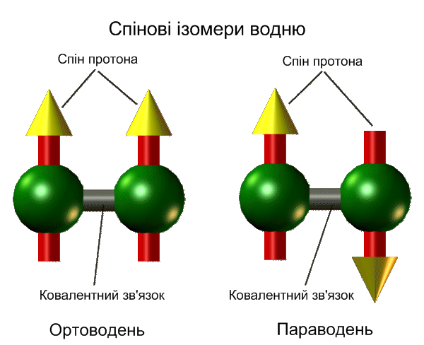 Орто- і параводень